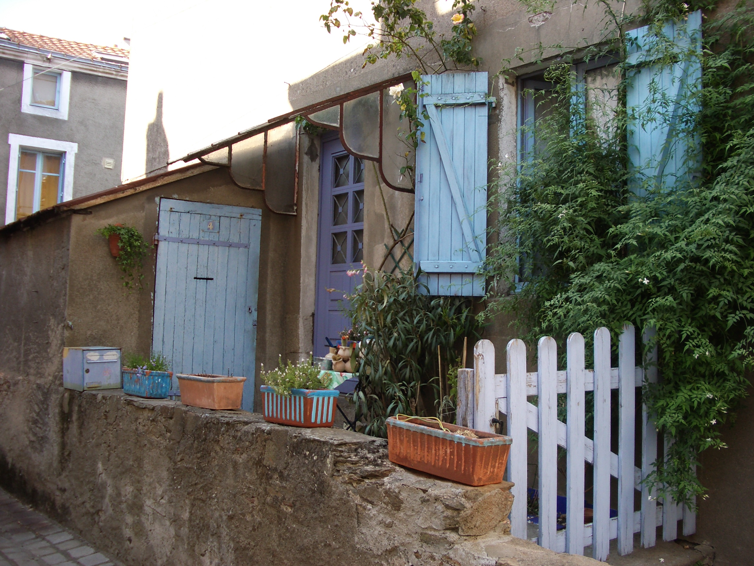 Trentemoult, petit village de pêcheur au sud de Nantes, rive gauche de la Loire en Loire-Atlantique.